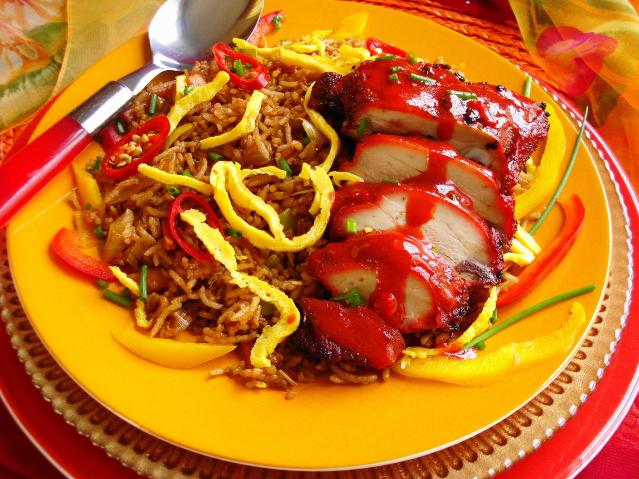 Nasi Goreng is met de komst van de Javanen uit Indonesië naar Suriname gebracht; door het gebruik van specifieke Surinaamse kruiden en specerijen en door de invloeden van de andere Surinaamse bevolkingsgroepen, is er een typisch Surinaamse Nasi Goreng Trafasie ontwikkeld.